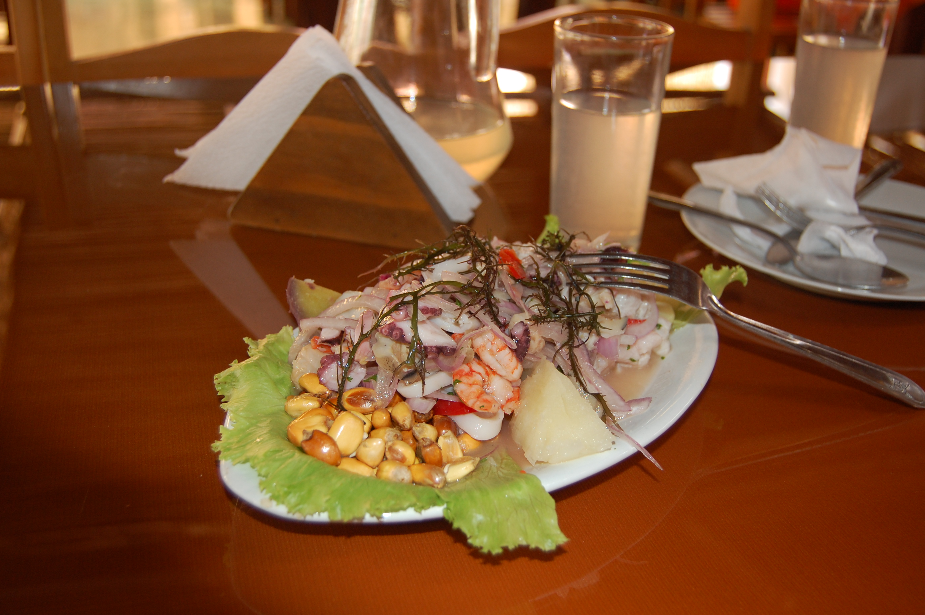 Ceviche färdig att avnjutas